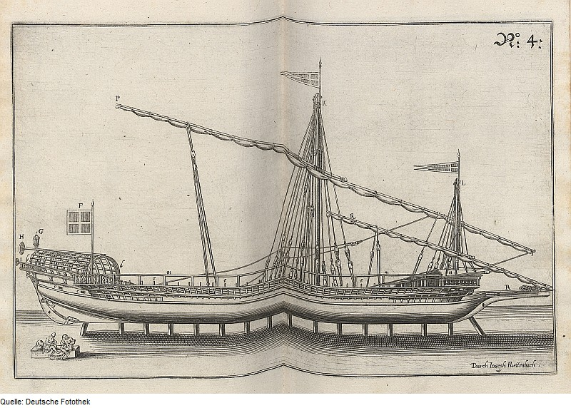 Original image description from the Deutsche FotothekSchiffbau & Kriegsschiff & Ruderschiff & Segelschiff & Werft & Holz